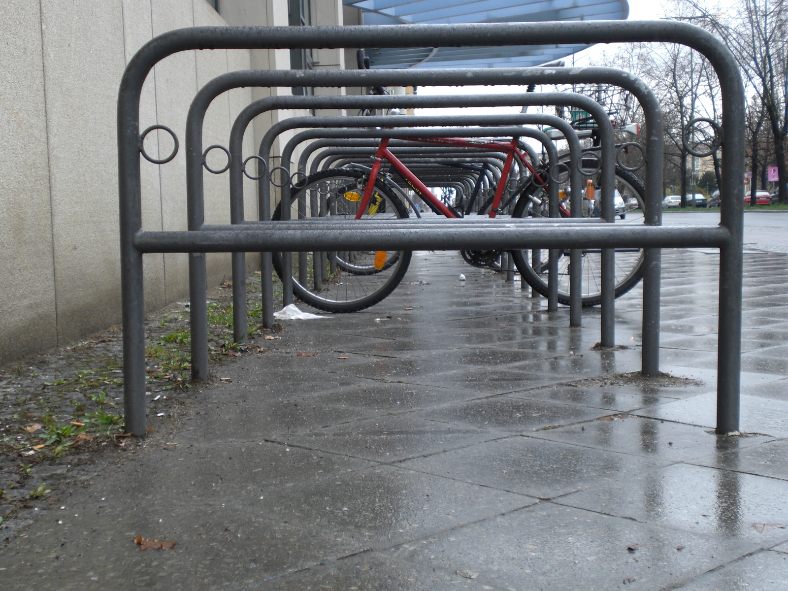 Kreuzberger Bügel vor der Kripo am T-Damm in Berlin